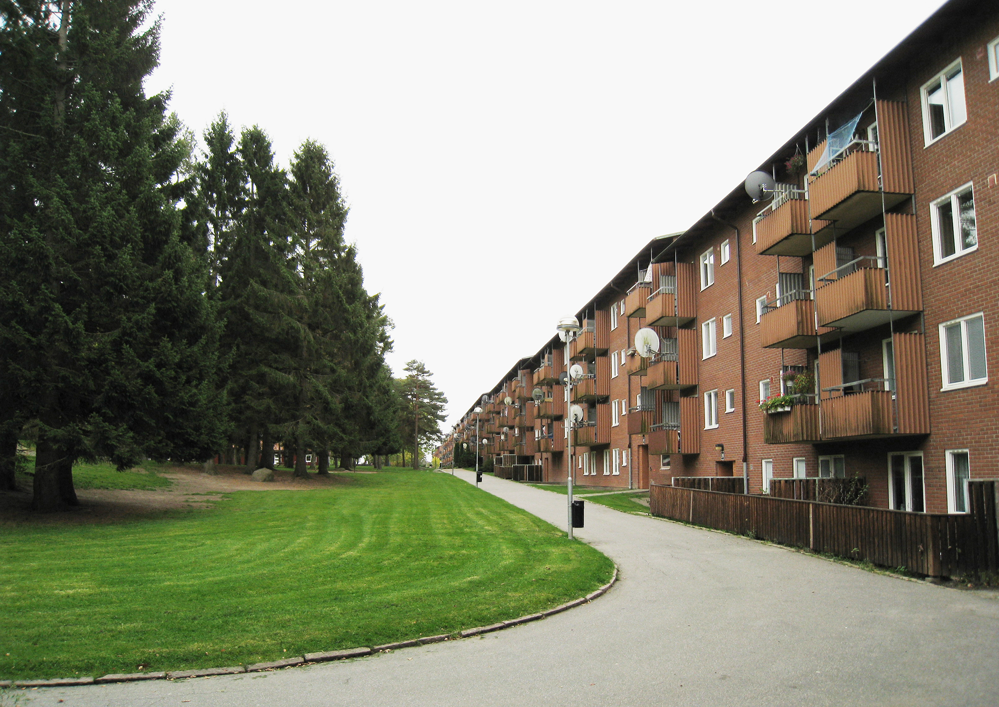 Housing estate. Merkuriusgatan, Bergsjön, Göteborg